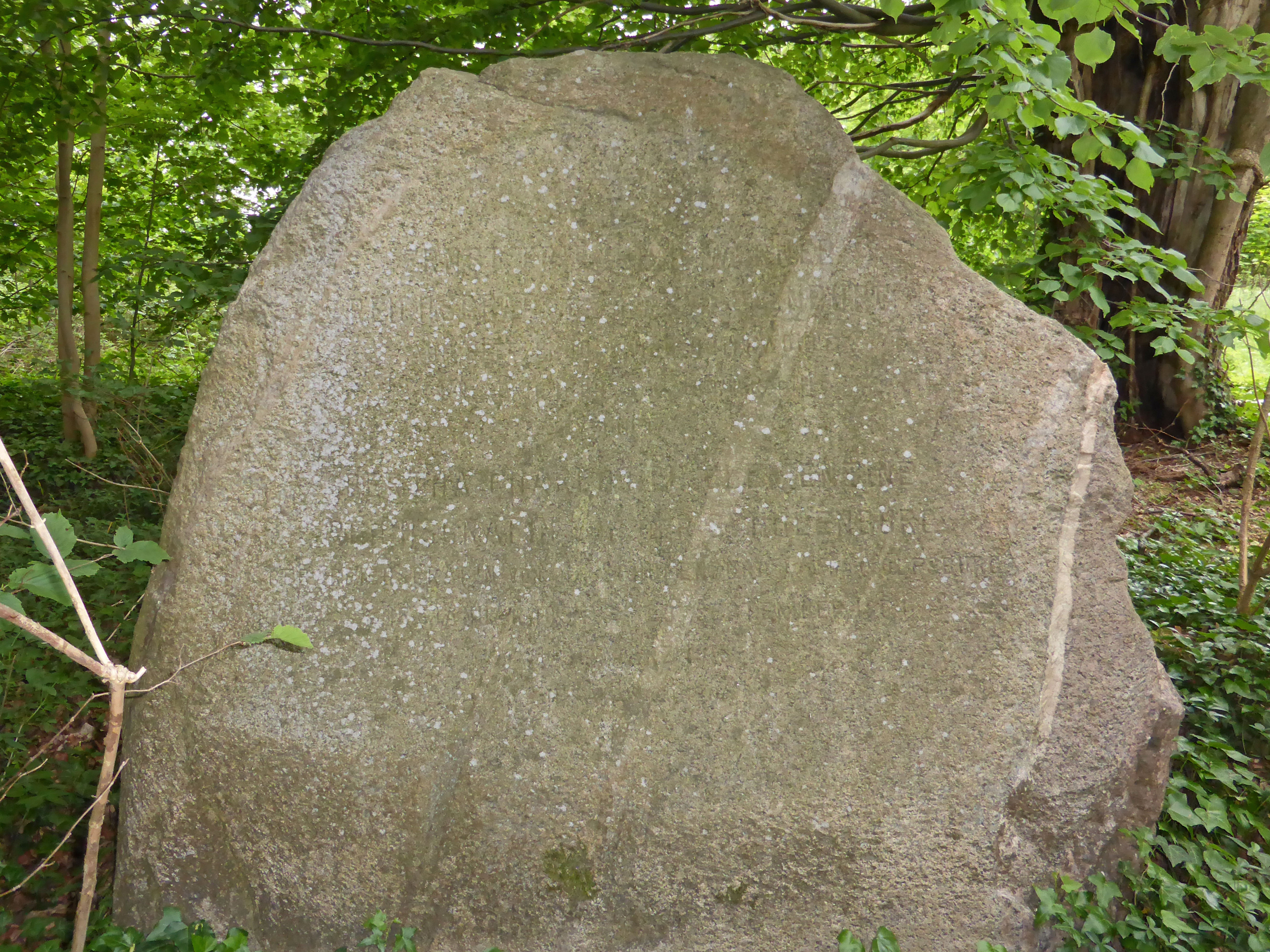 Gedenkstein an Ernst Friedrich Werner Reichsgraf von der Schulenburg und seine Frau Bertha Charlotte Clementine geb. Reichsgräfin von der Schulenburg aus dem Hause Wolfsburg auf dem Friedhof am Eiskuhlenberg bei Beetzendorf.